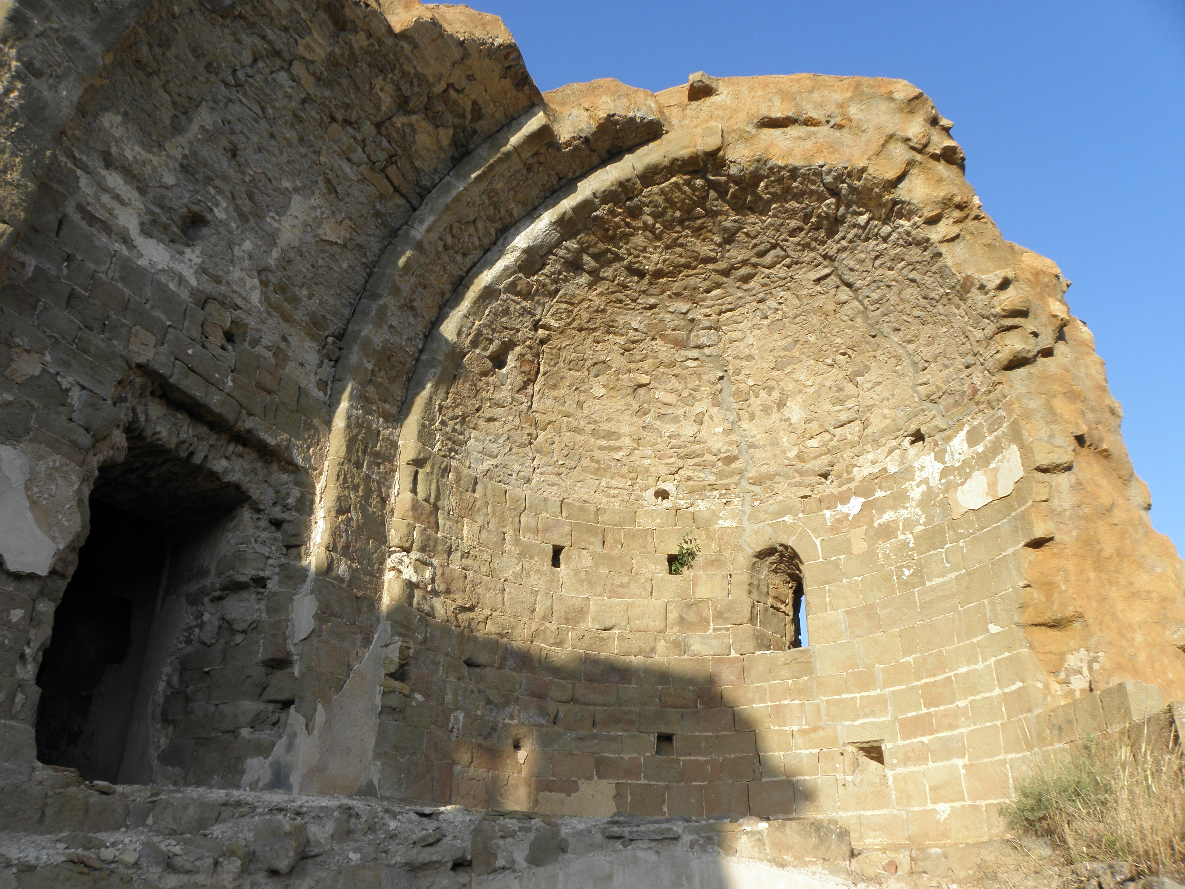 Esglesia romànica de Sant Pere de Madrona (Pinell de Solsonès). L'absis.